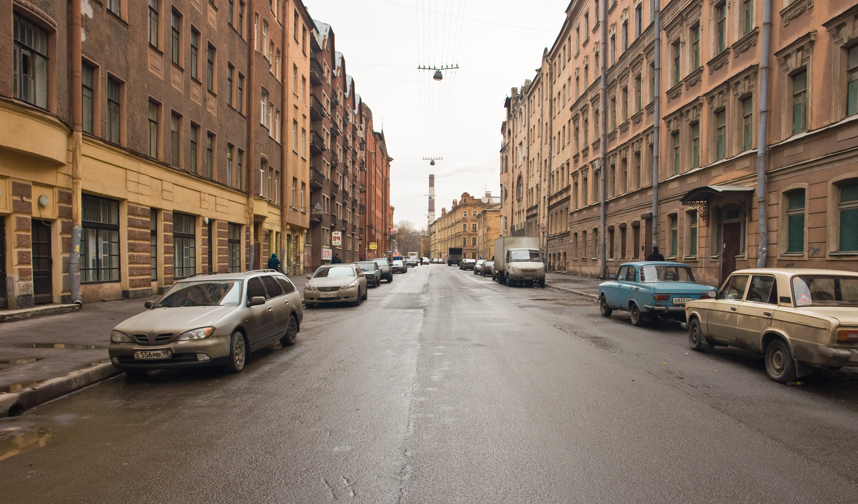 Перекупной переулок, Санкт-Петербург. Вид в сторону проспекта Бакунина